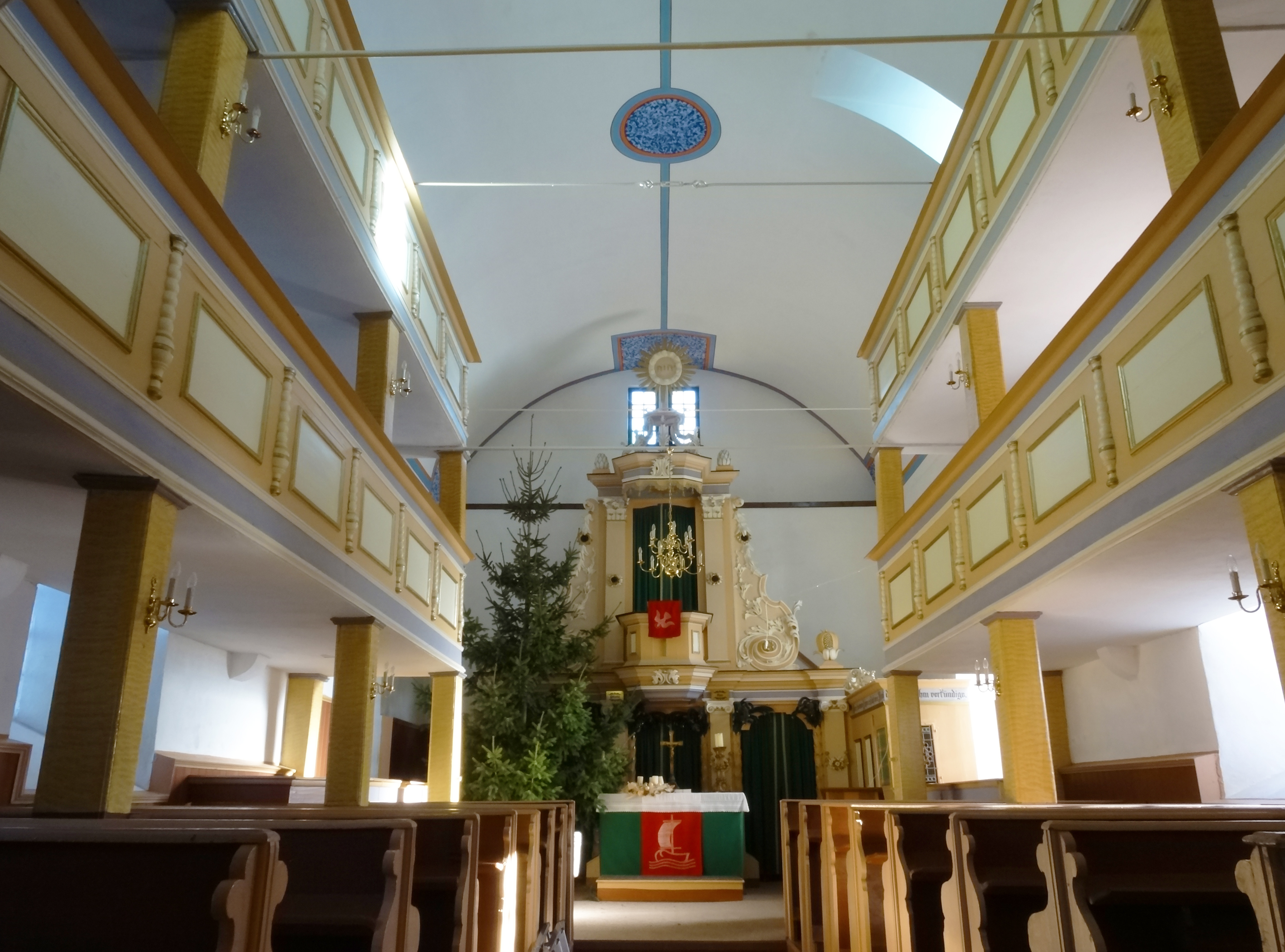 Die barocke Kirche Gloria Deo in Hohenebra von 1726 mit Kanzelaltar von Johann Caspar Jacobi (1725/26)